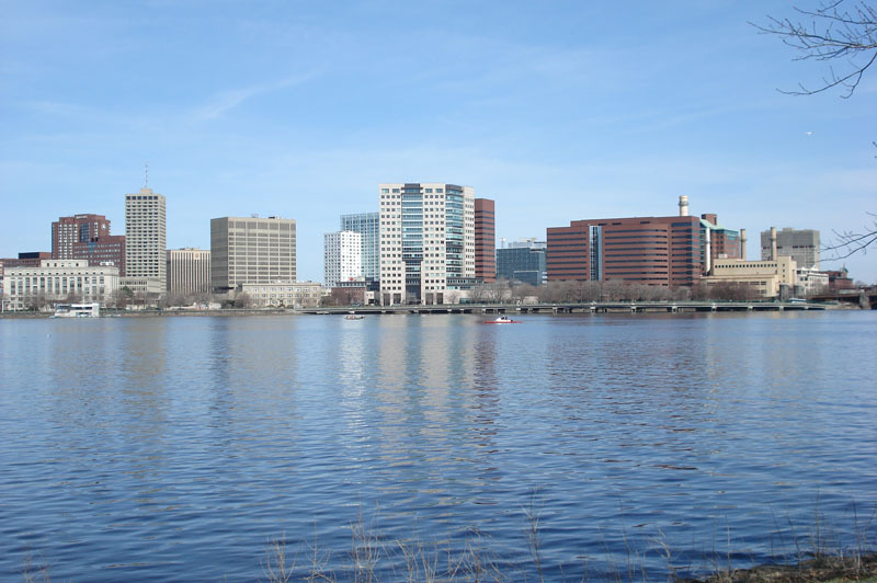 Cambridge Skyline